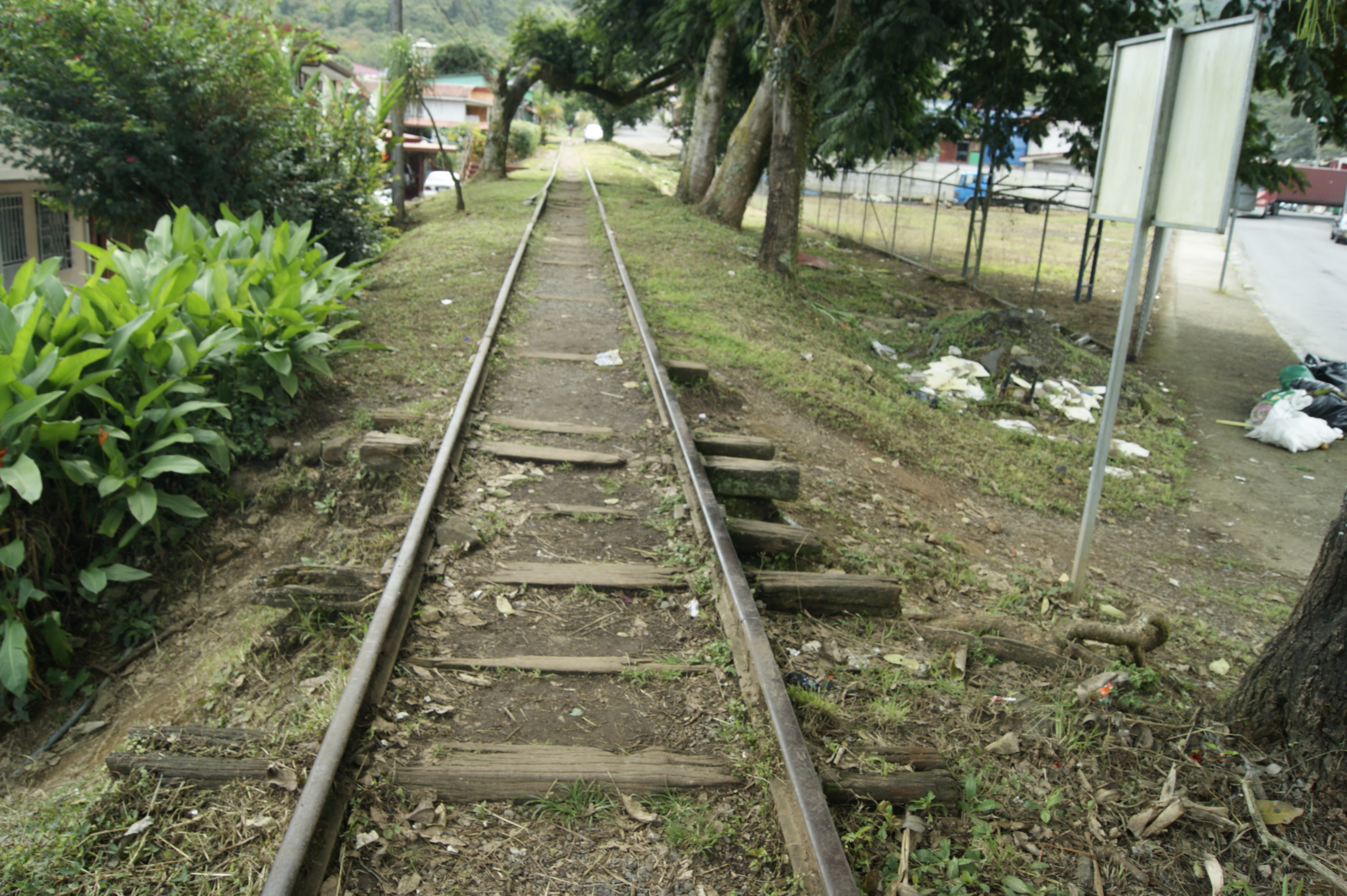 Restos de la construcción de línea del tren.